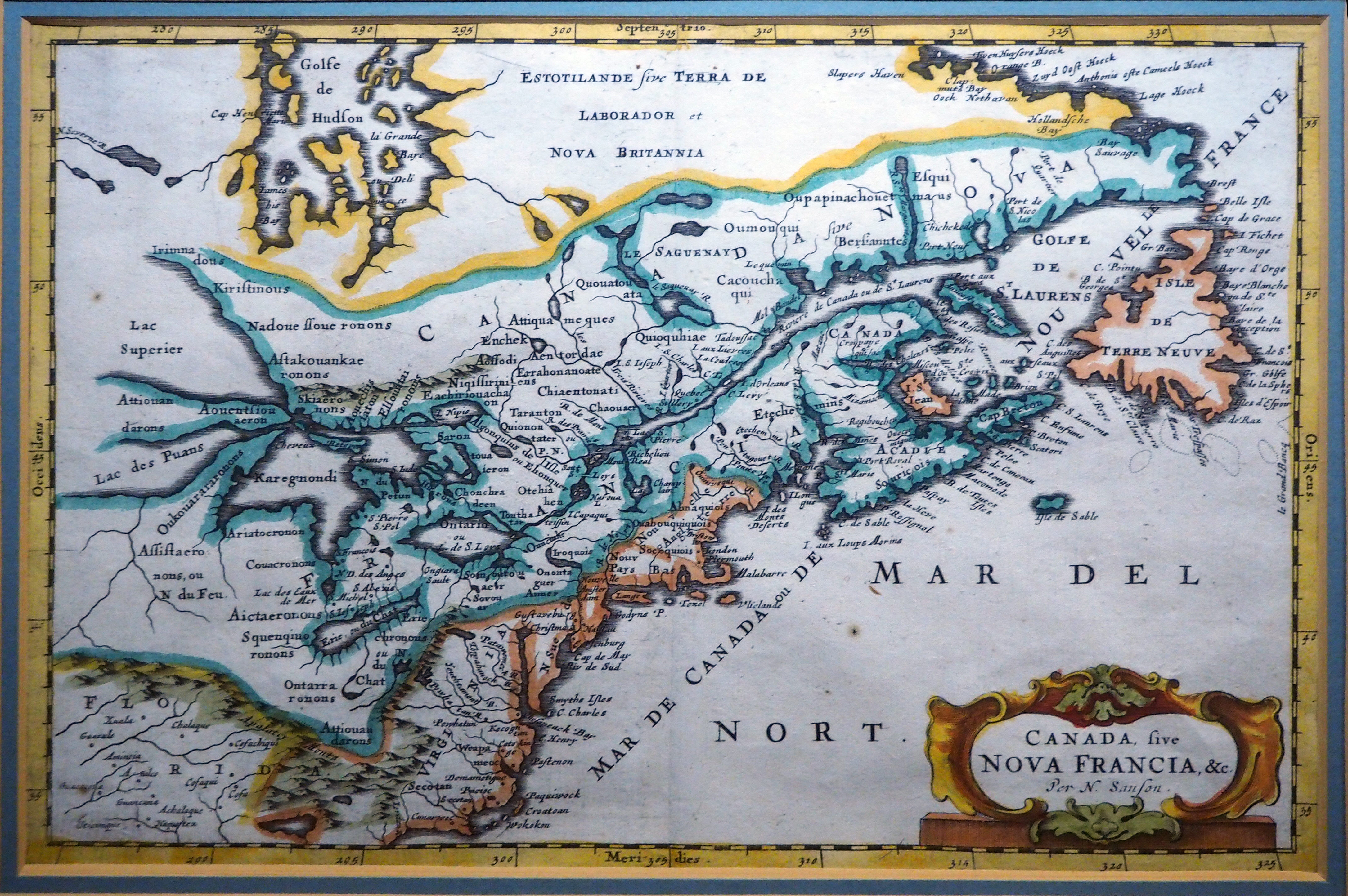 Carte de la Nouvelle-France par Nicolas Sanson, réalisée en 1650. Carte exposée à Sainte-Marie-au-pays-des-Hurons, Ontario.